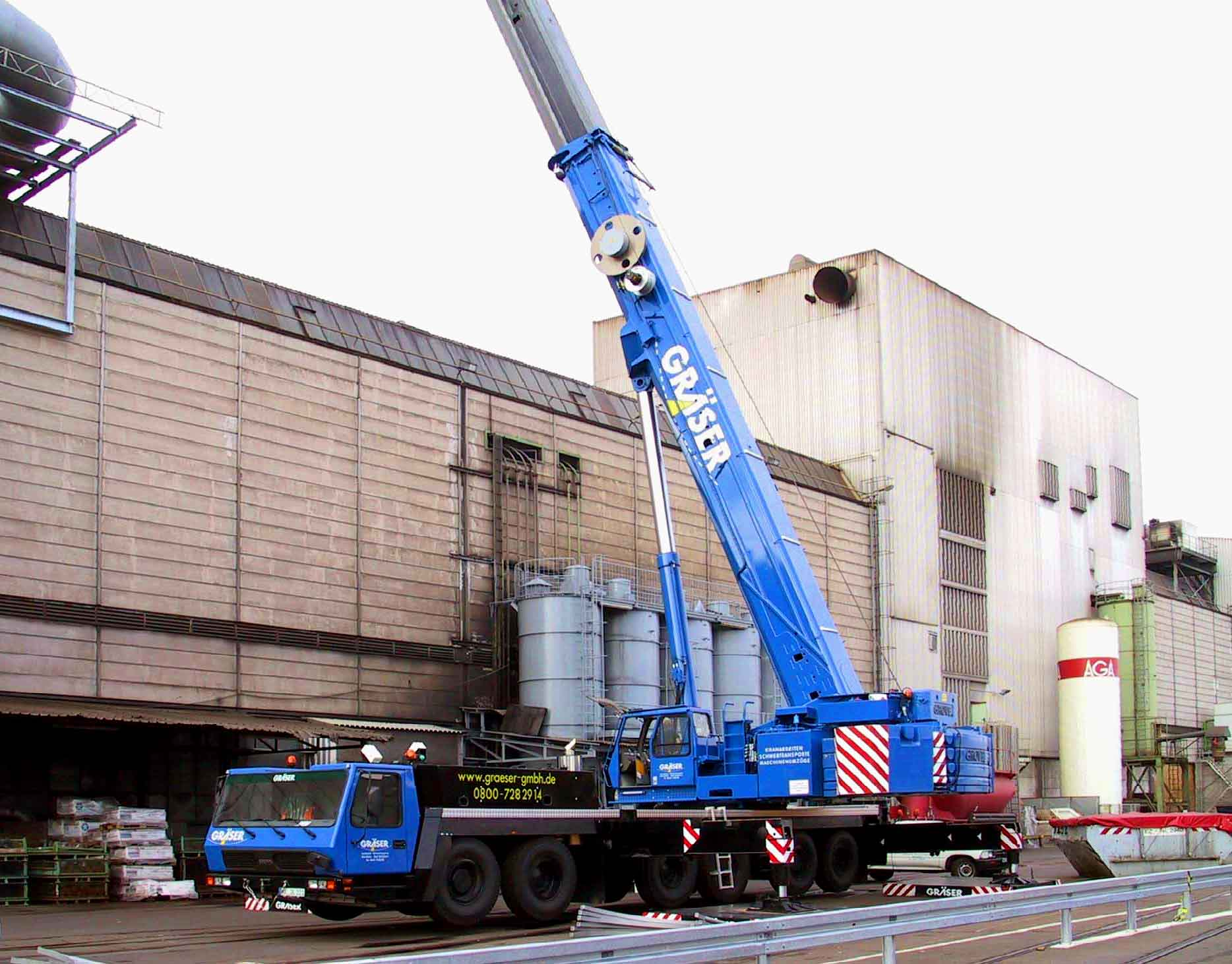 Das Bild zeigt einen 220-Tonnen-Teleskopkran in Arbeitsstellung, welches ich selber fotografiert habe. Kategorie:Bild:Kran